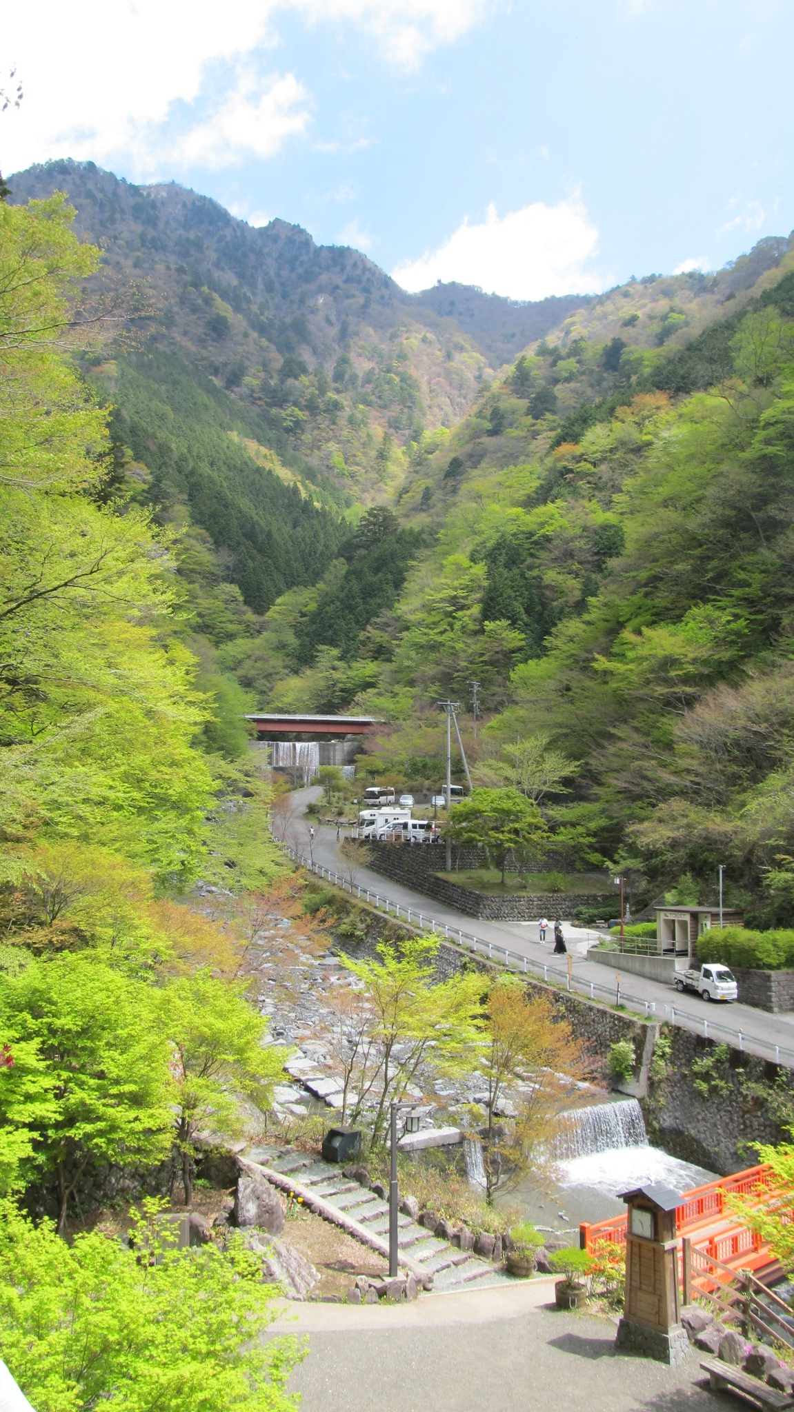 梅ヶ島温泉（5月上旬）